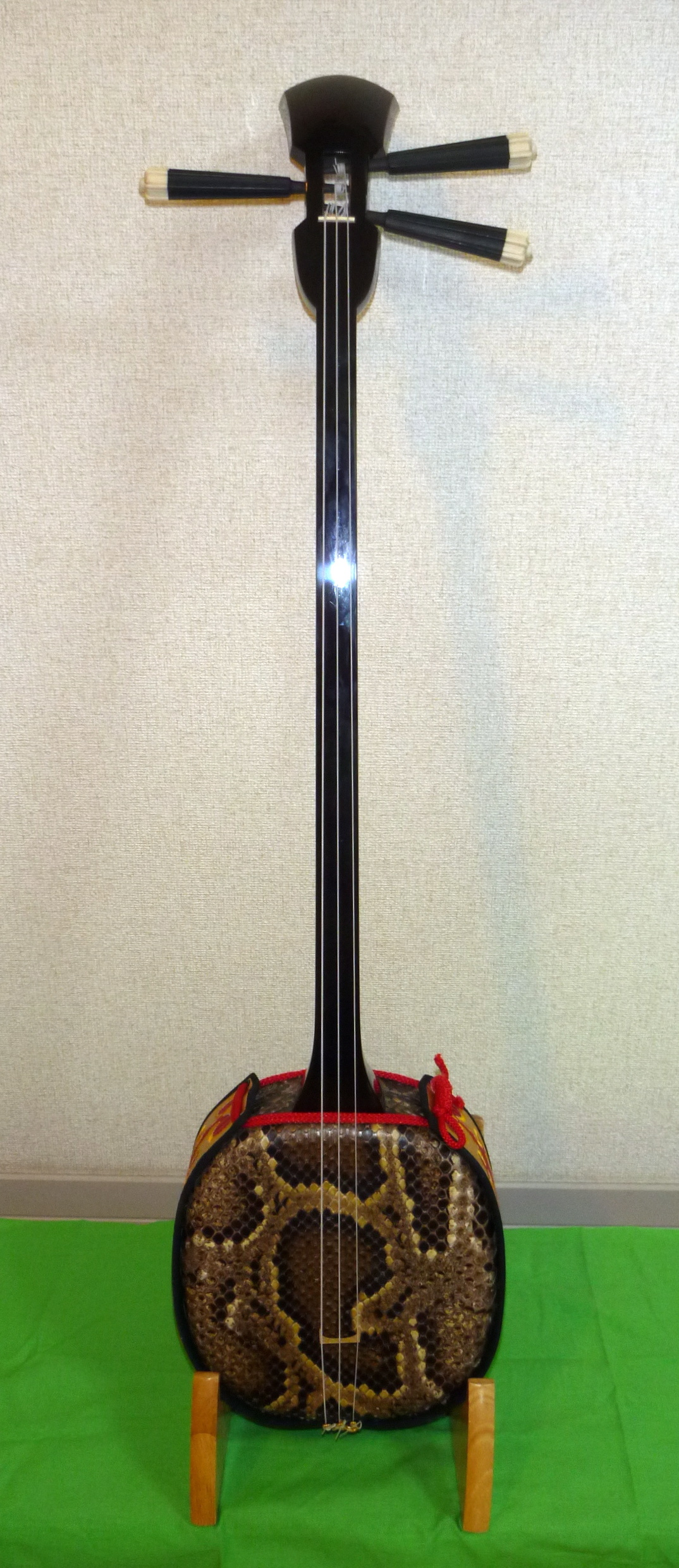 沖縄の楽器である三線の真壁型の中でも志多伯開鐘の写しにあたるもの。作者は那覇の上原正男